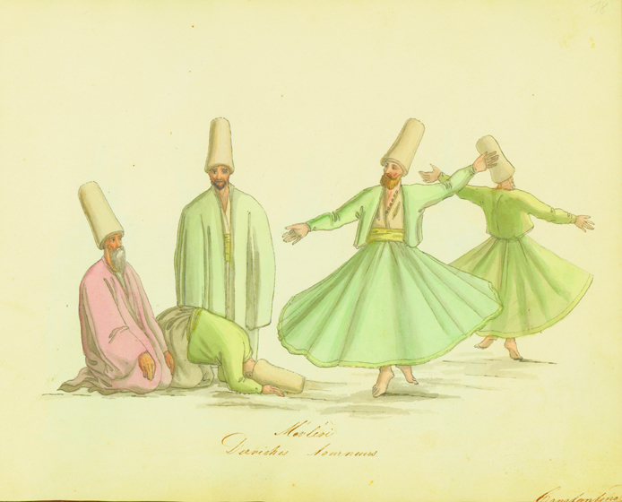 Movlesi. Derviches Tourneurs